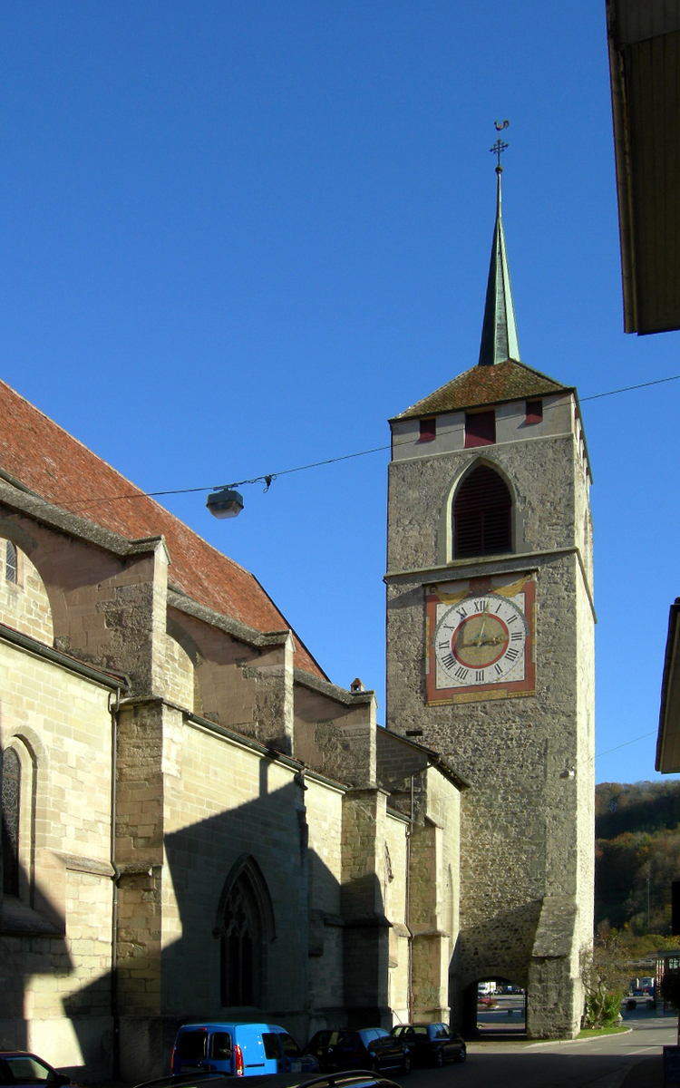 Moudon, église St-Etienne